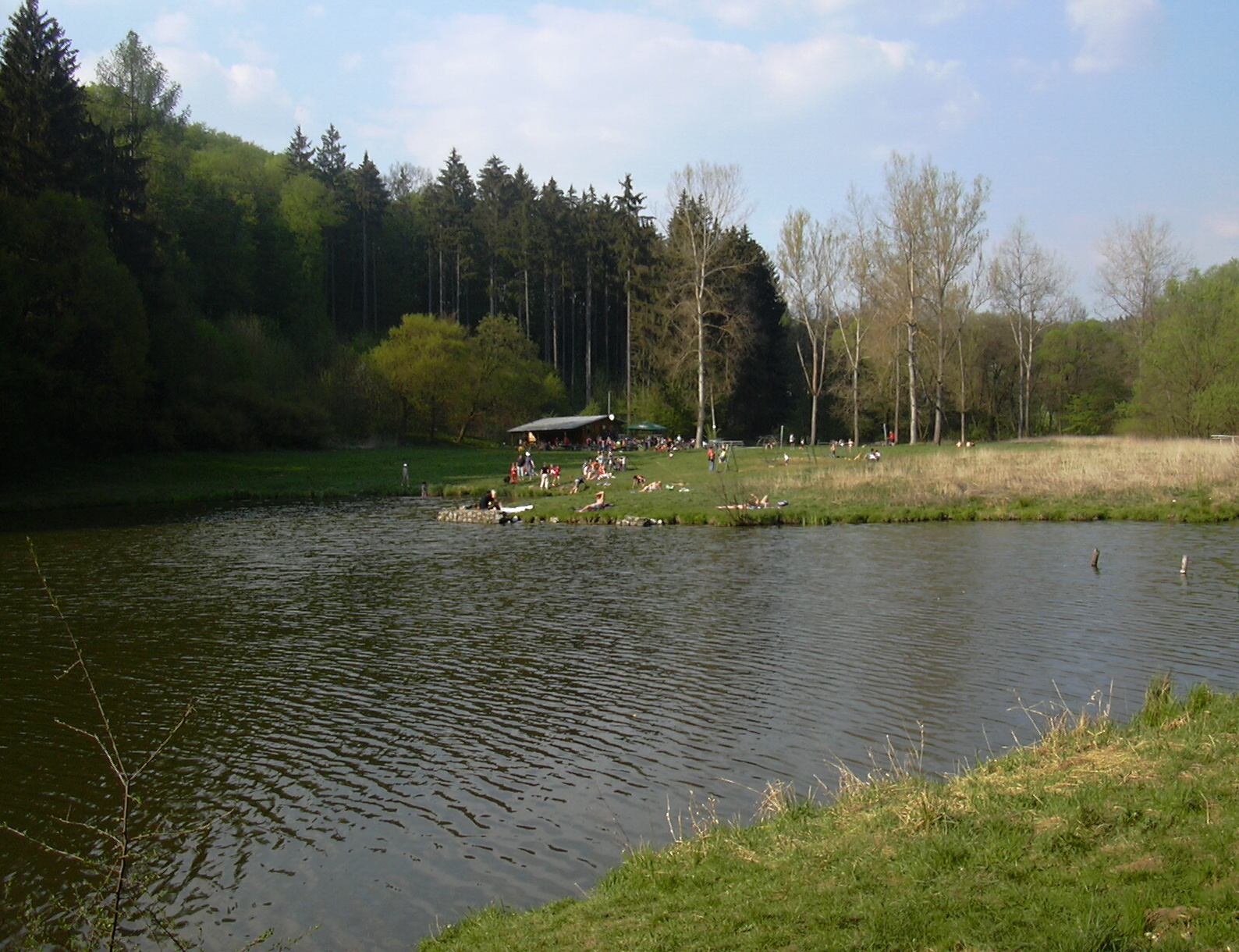 vodní nádrž Hádek (czech republic)